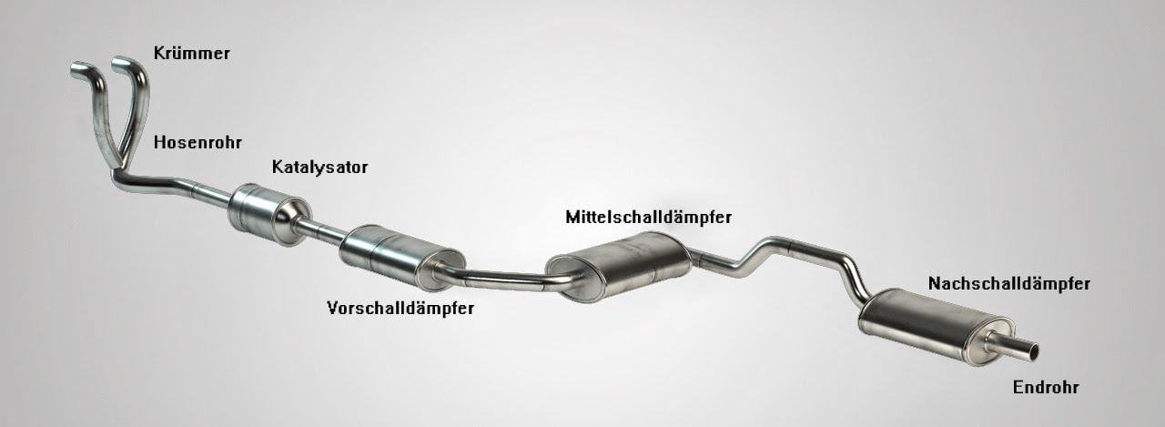 Aufbau eines Auspuffes